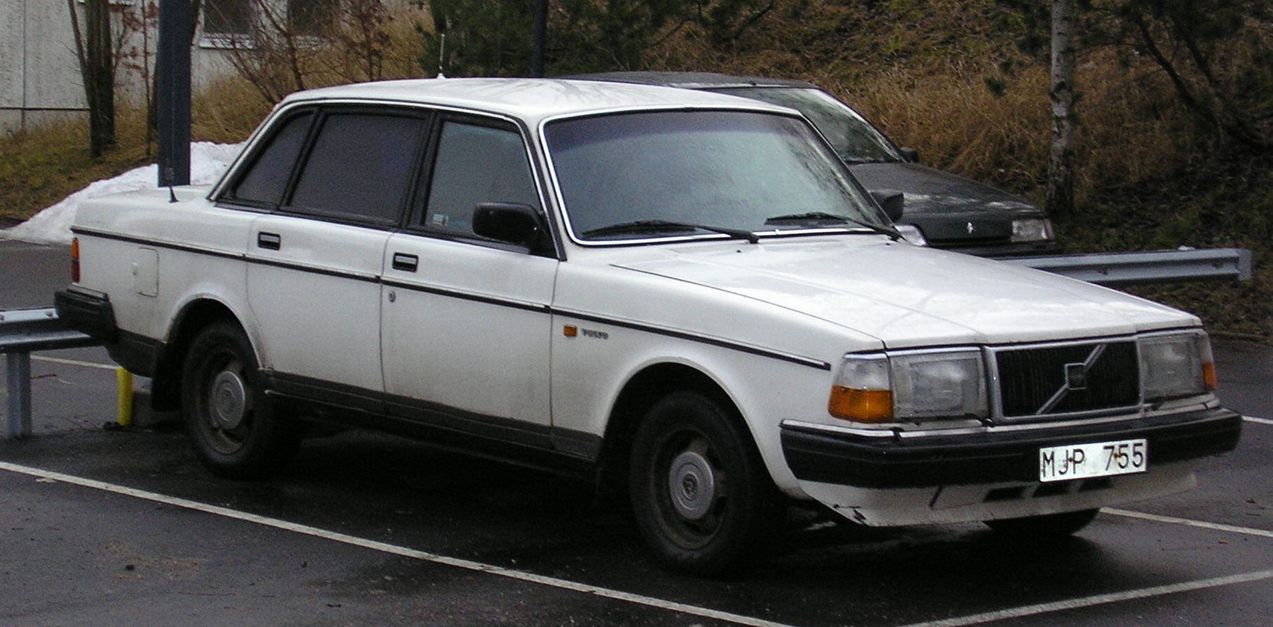 A 1987 Volvo 244.